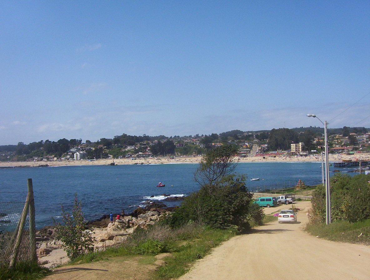 La playa Los Corsarios, la principal de El Quisco, vista desde la calle Costanera en el sector de La Puntilla. Provincia de San Antonio, V Región de Valparaíso, Chile.